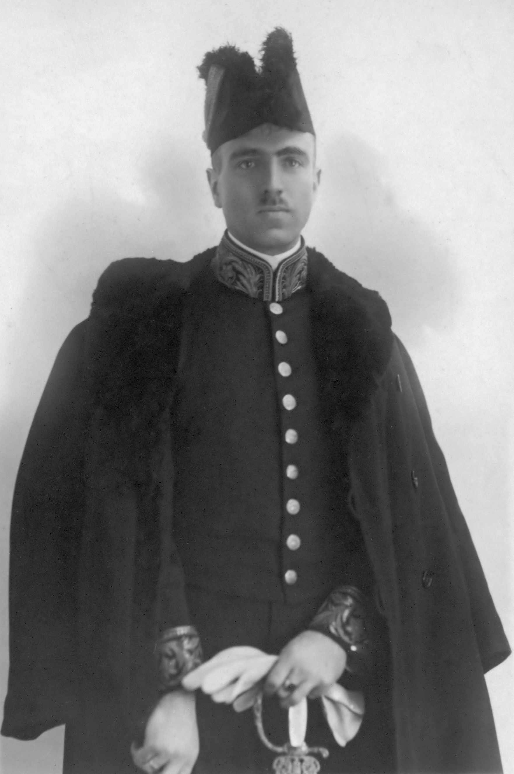 Portret van Ph. C. Visser in zijn ambtskostuum als attaché aan de Nederlandse ambassade in Zweden